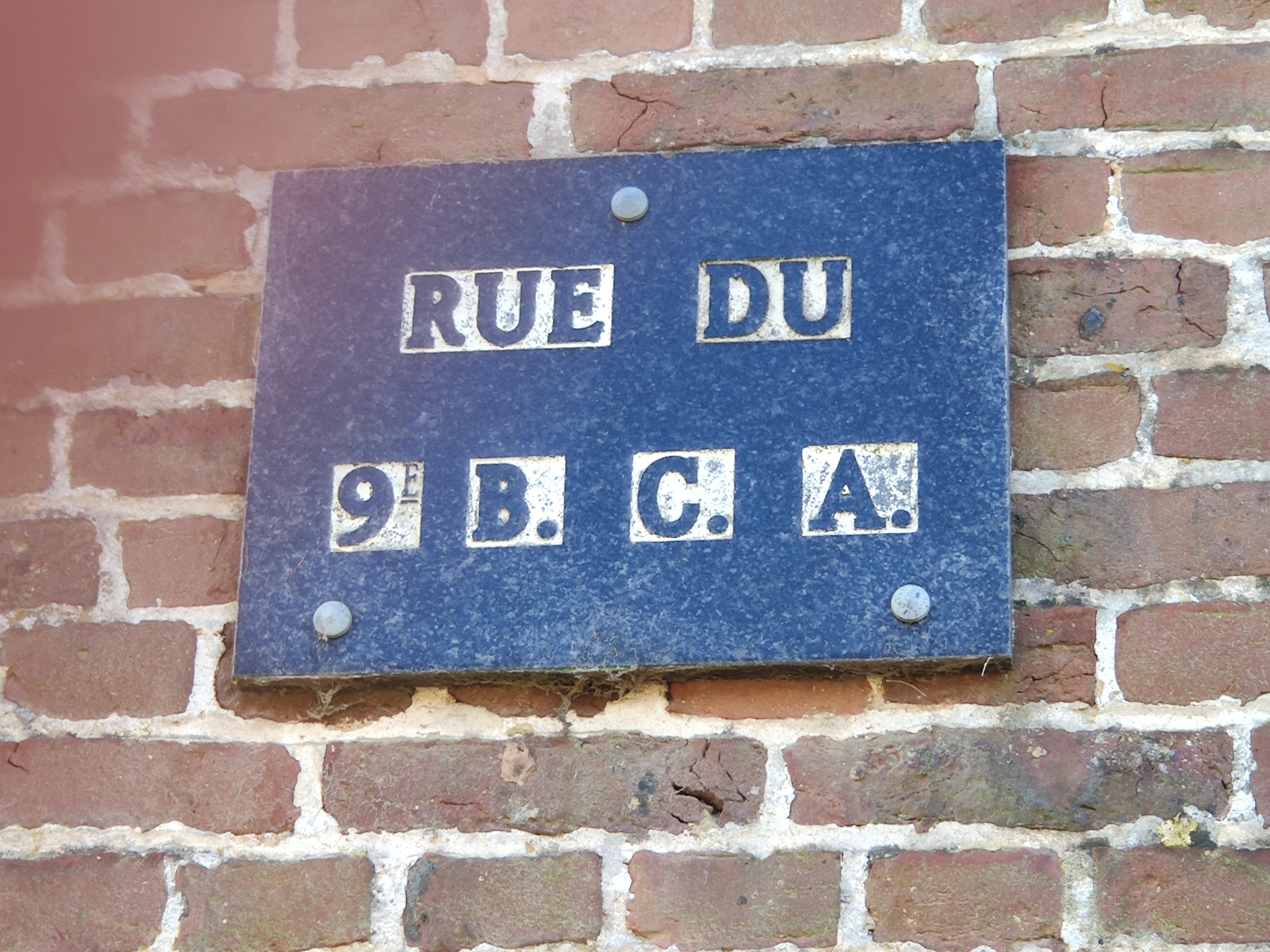 Offignies : Plaque d'une partie de la rue principale du village, en hommage au 9e bataillon de chasseurs alpins, qui combatit au village lors de la Bataille de France (combat d'Orival-Offignies)